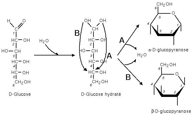 Réaction de cyclisation du glucose, forme de Haworth. Mars 2005 Création personnelle.